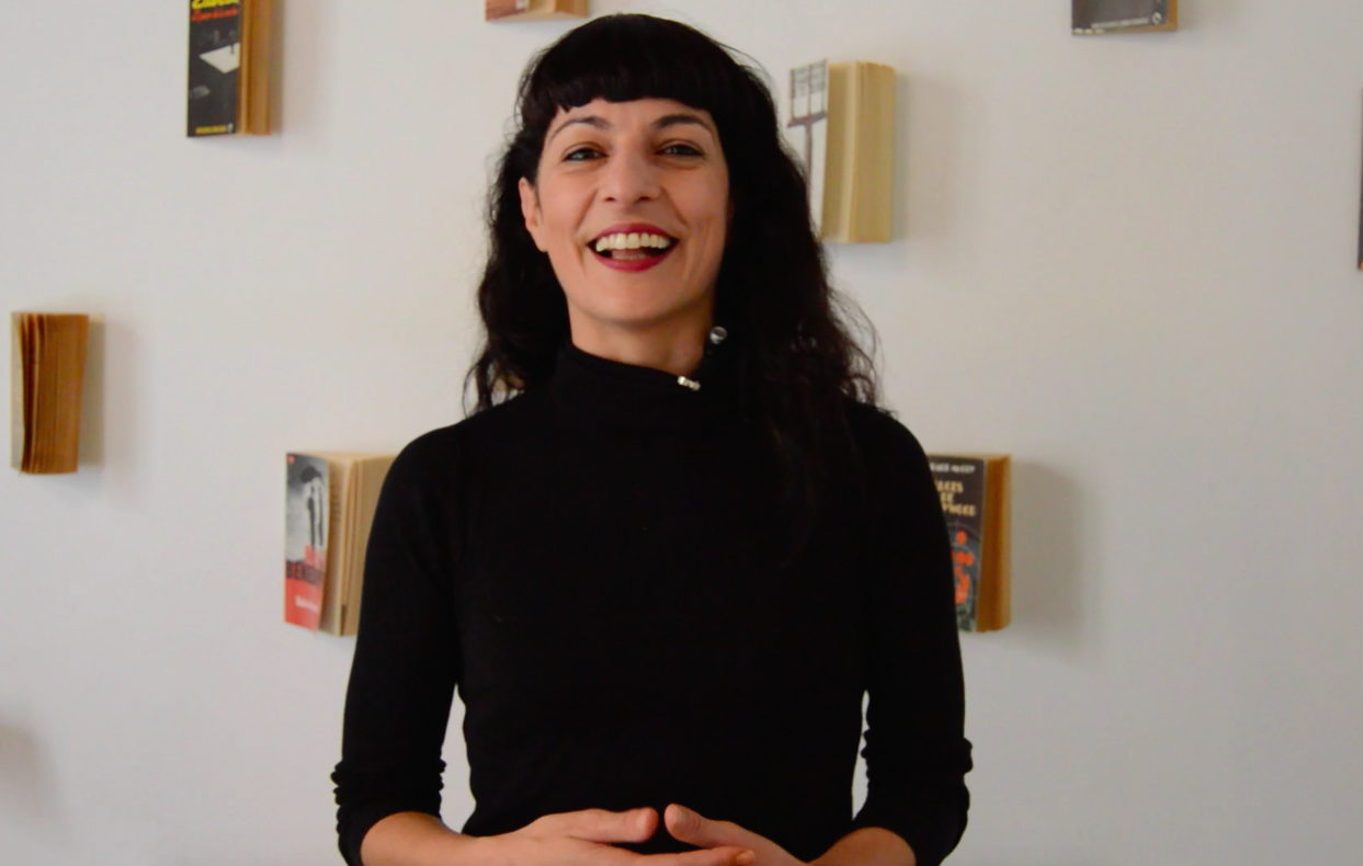 Roser Amills 2016 color